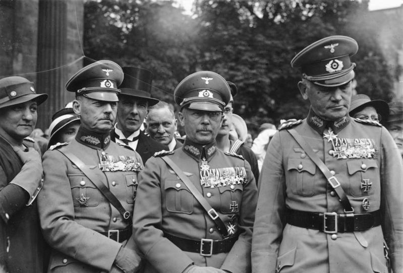 1934 am Ehrenmal Unter den Linden, Berlin